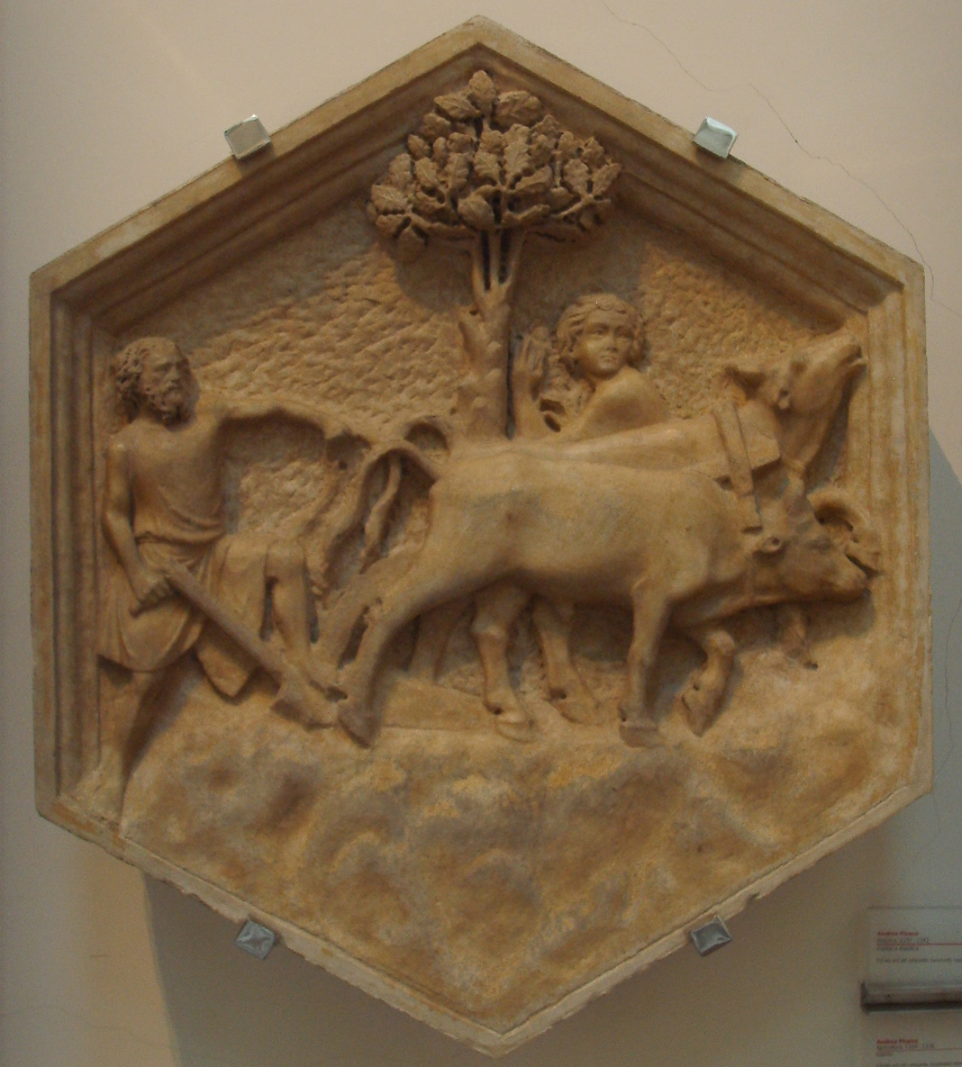 Formella 17, agricoltura, andrea pisano, 1334-1336